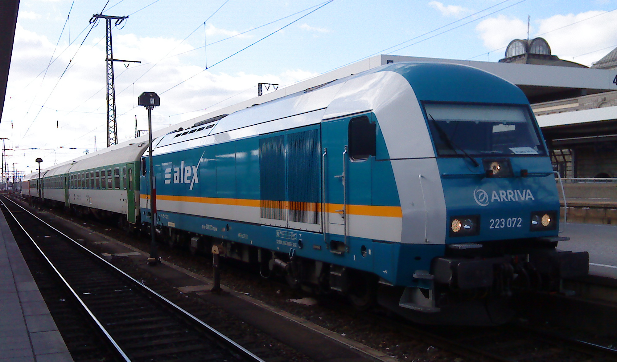 ALEX nach Praha hl. n. vor der Abfahrt in Nürnberg Hbf.